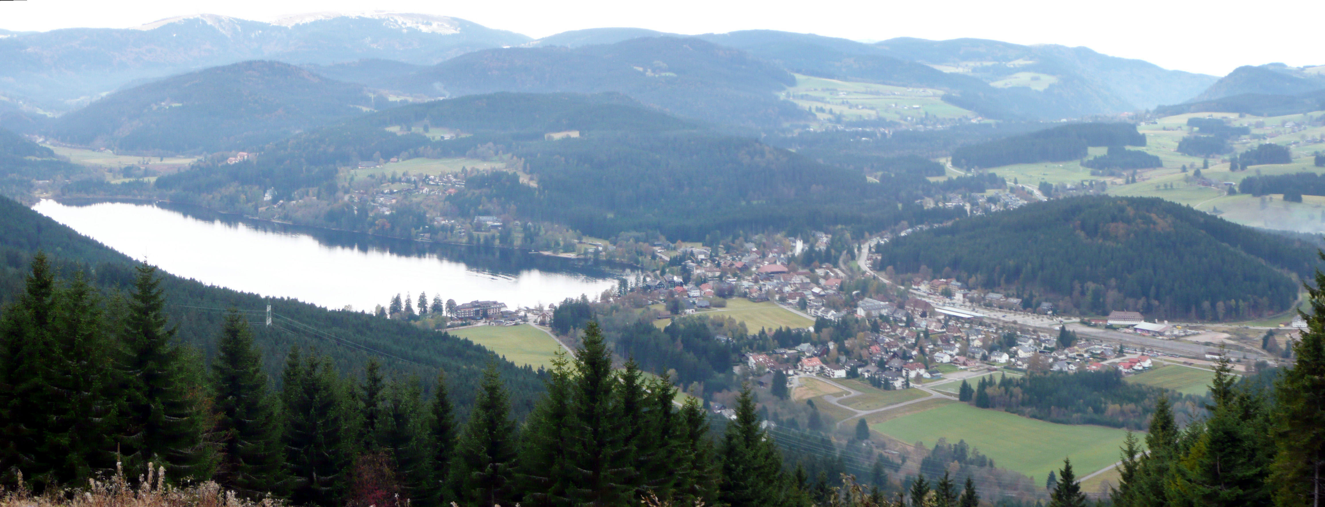 Panorama vom Hochfirst mit dem Titisee, Feldberg und dem Ort Titisee